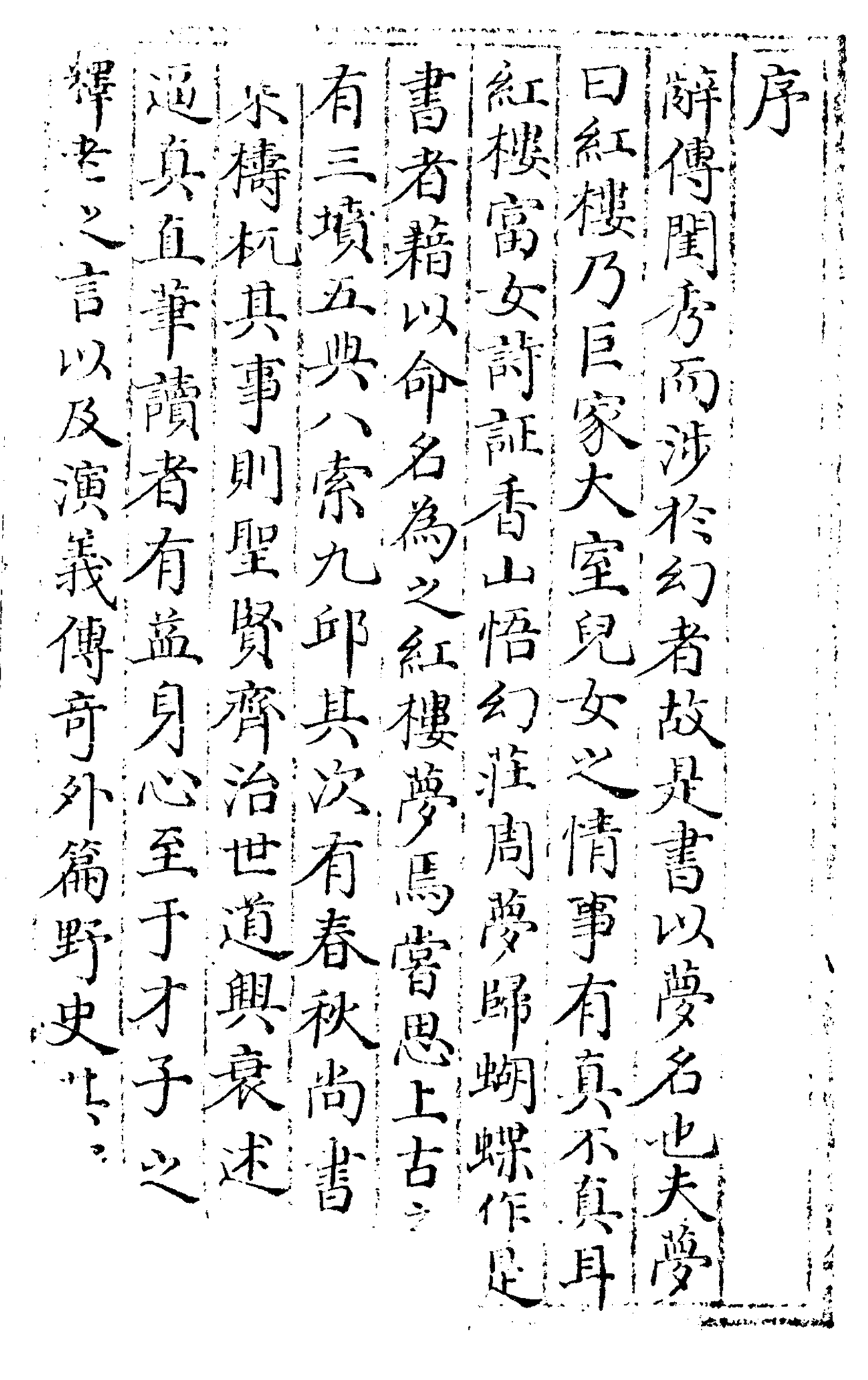 夢覺本序言